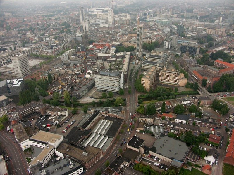 Centrum van Eindhoven vanuit een luchtballon. (8 juli 2005)